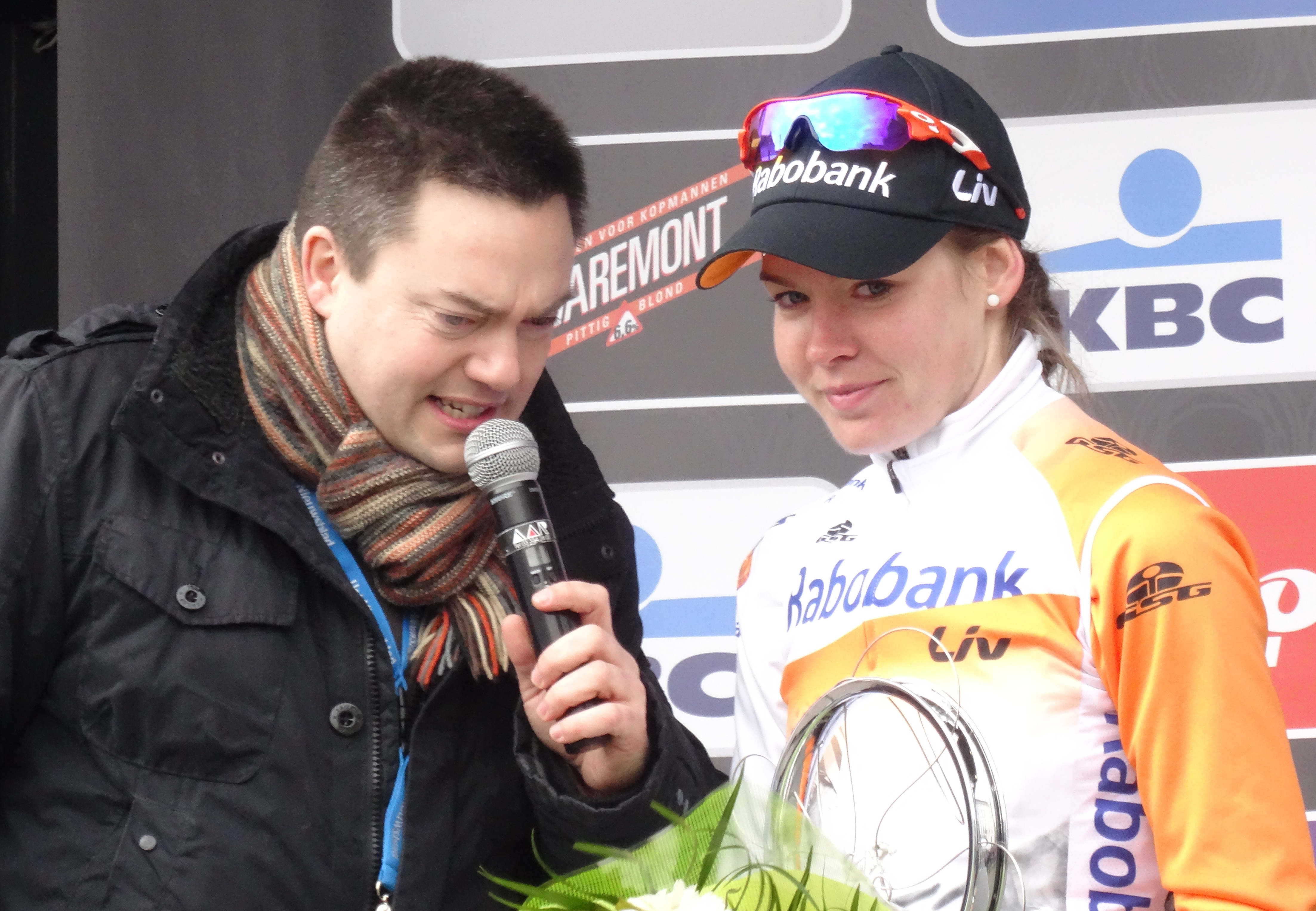 Reportage réalisé le samedi 28 février à l'occasion du départ et de l'arrivée du Circuit Het Nieuwsblad 2015 à Gand, Belgique.